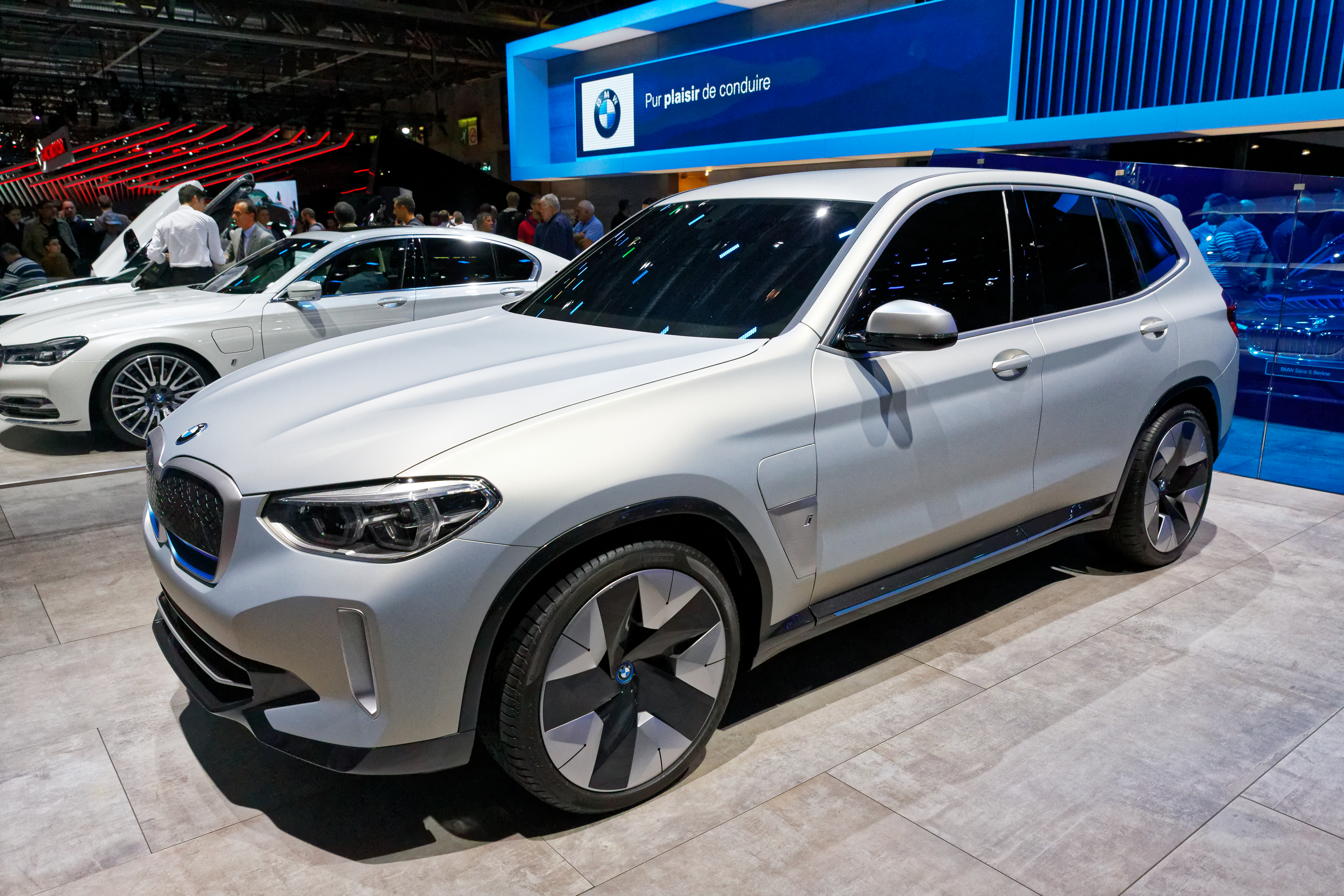 Une BMW iX3 Concept exposée lors du mondial de l'automobile de Paris 2018.